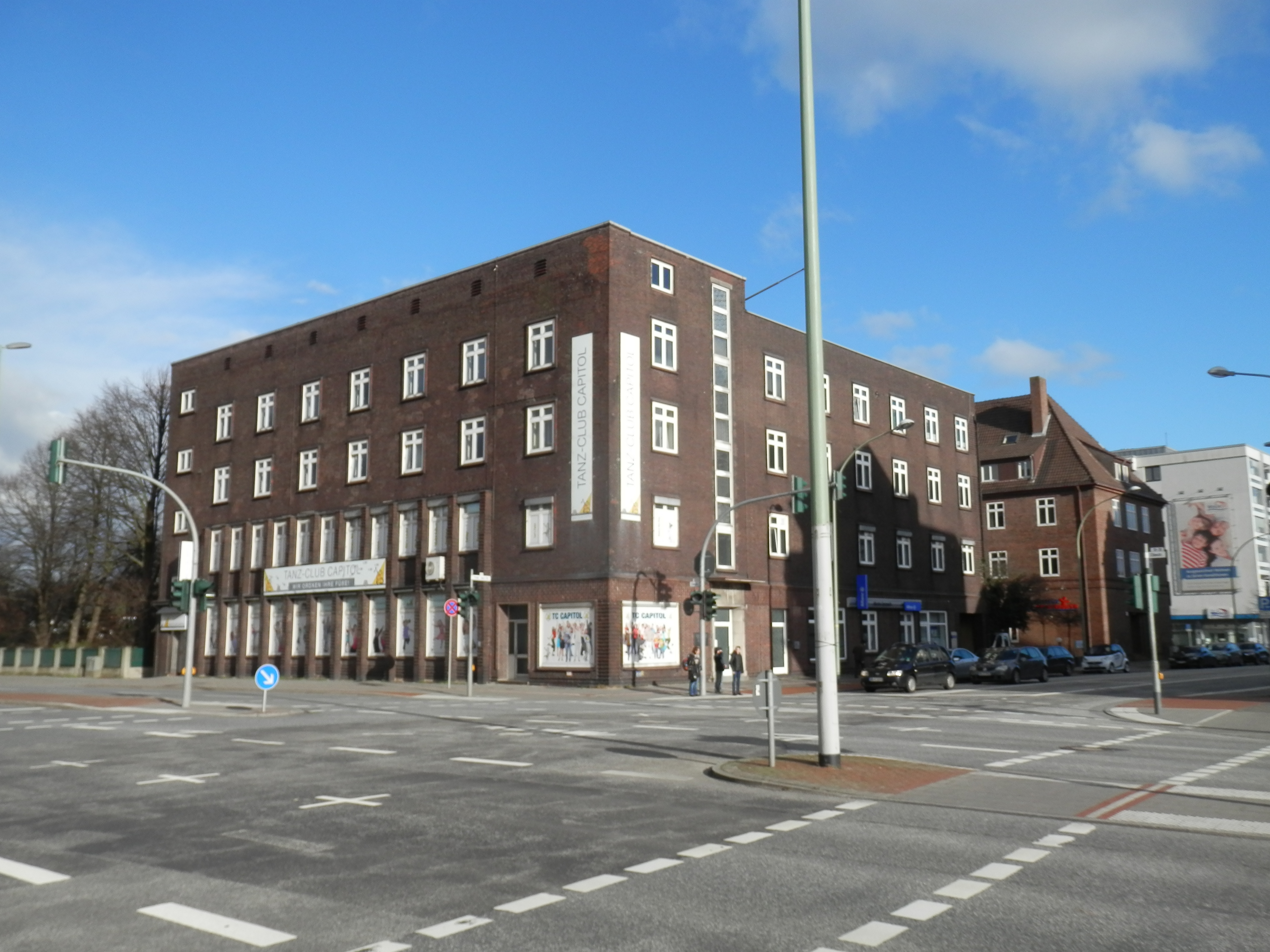 Norddeutsche Volksstimme in Bremerhaven, Friedrich-Ebert-Straße 1 Das abgebildete Objekt ist ein geschütztes Kulturdenkmal in der Freien Hansestadt Bremen, mit der Nr. 3061 beim Landesamt für Denkmalpflege registriert.